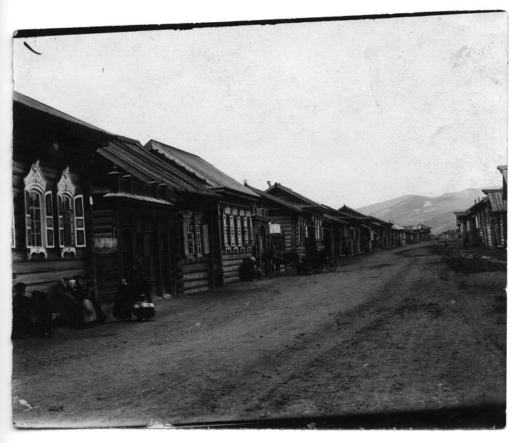 Улица села Тарбагатай